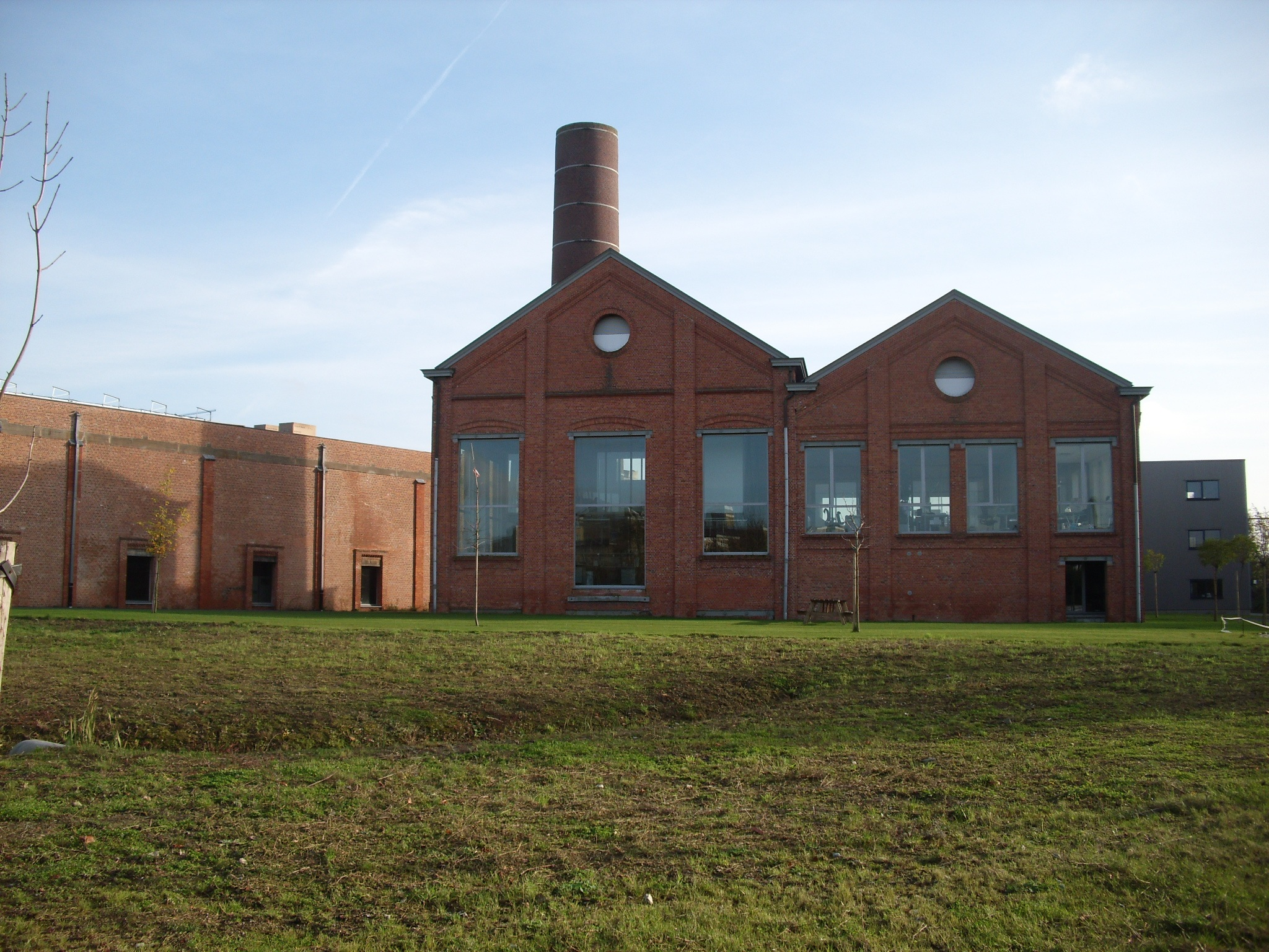 Stookketelgebouw - Puntfabriek (Arbed) - Gentbrugge - Gent - Oost-Vlaanderen - Vlaanderen - België